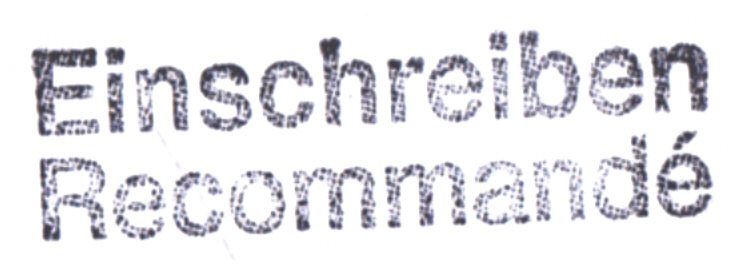 Einscheibenstempel der Deutschen Post AG